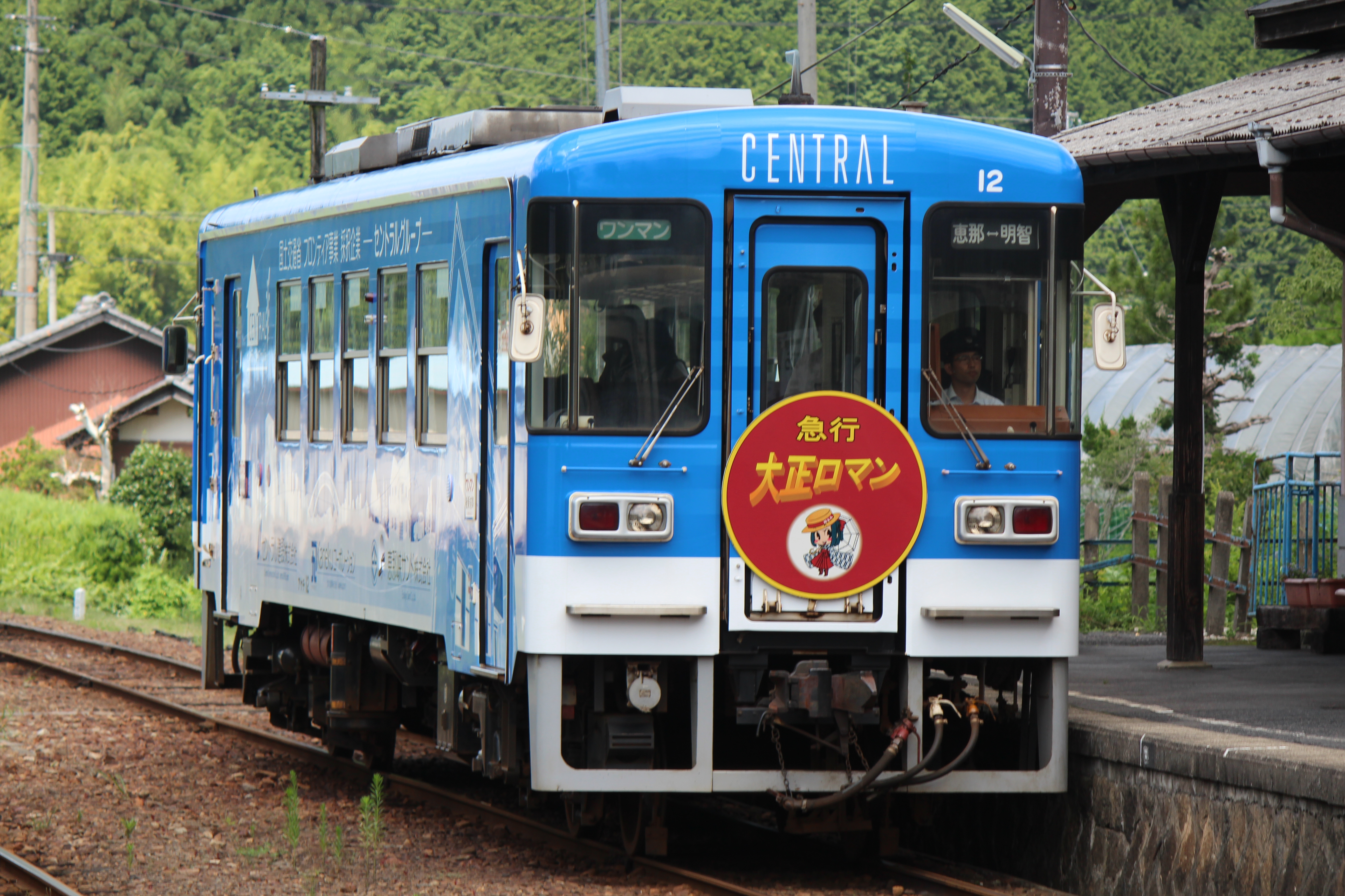 岩村駅に入線する大正ロマン号